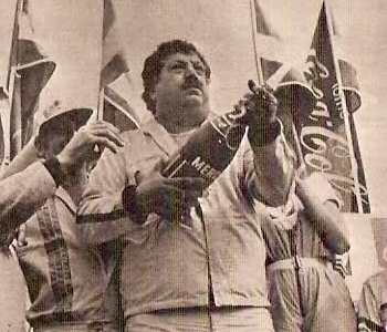 Octavio Justo Suárez, piloto fallecido en ejercicio de la presidencia de la Asociación Corredores de Turismo Carretera en 1984.